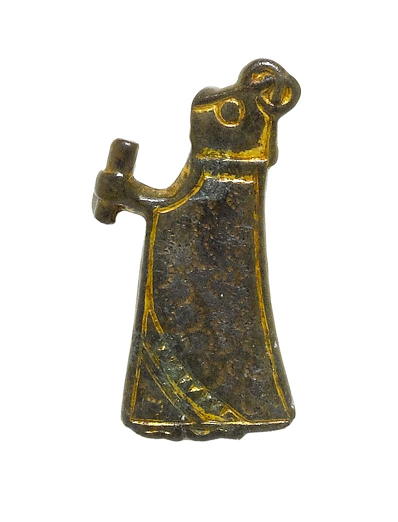 Hængesmykke: Valkyrie. Fra Nygård, Klemensker sogn. - See more at